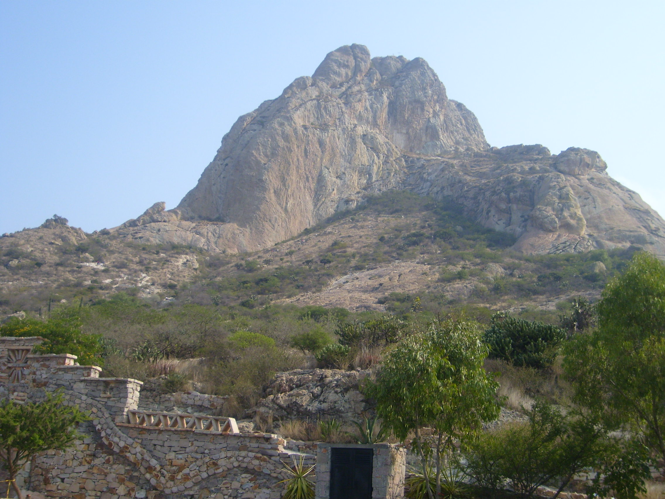 Fotografía de la Peña de Bernal, en el pueblo de Bernal, Estado de Querétaro, México.